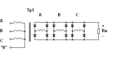 Трёхфазный выпрямитель "три параллельных полных моста".